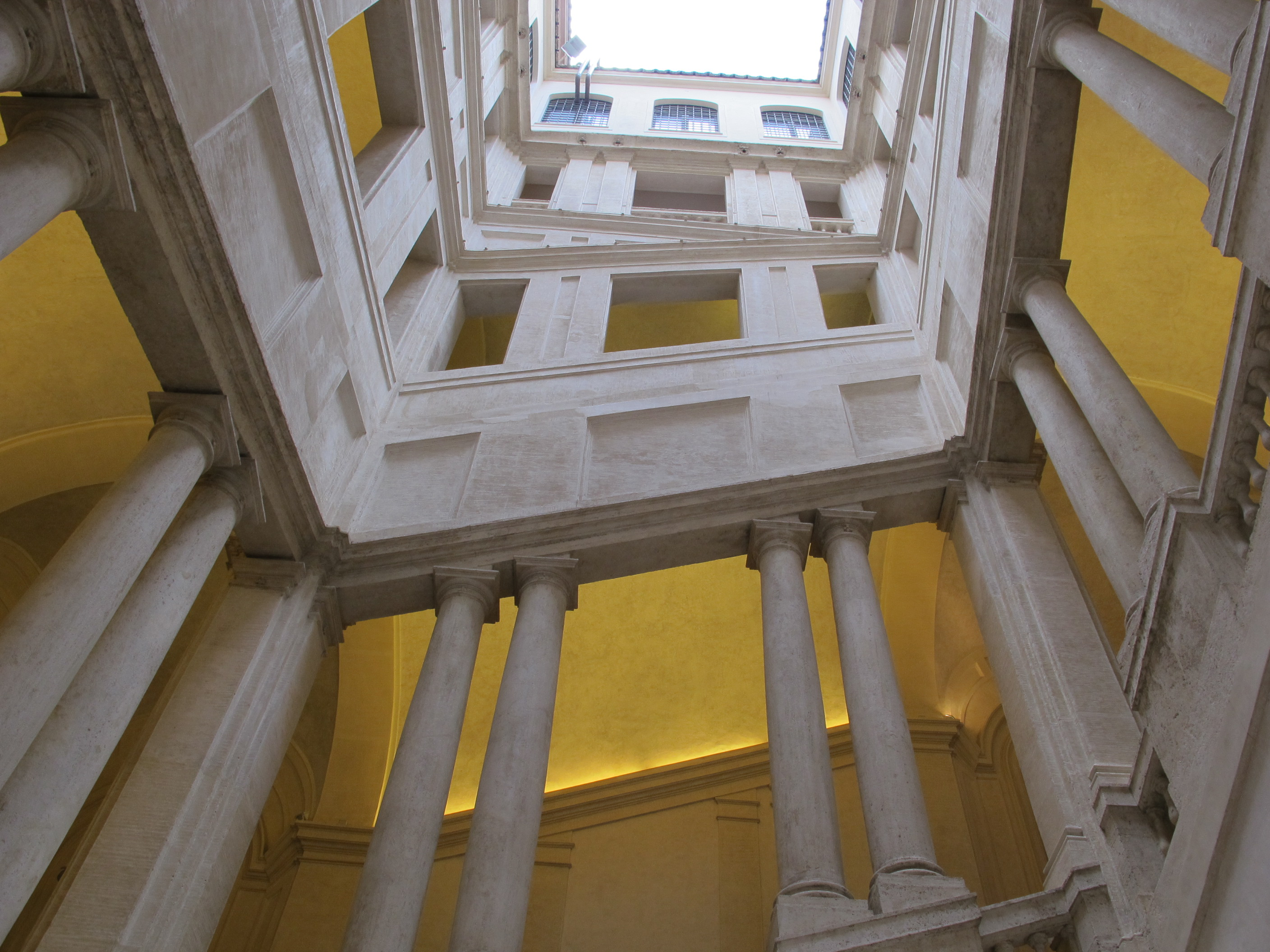 Palazzo barberini, scalone del bernini